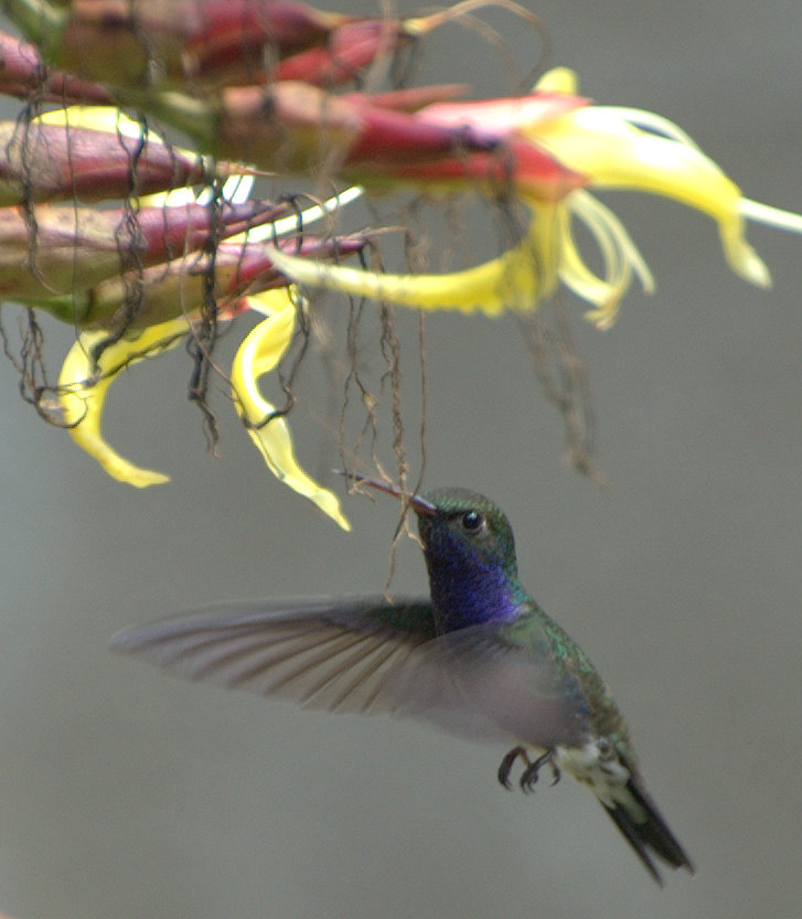 Margem do rio Ribeira de Iguape próximo à cidade de Registro-SP